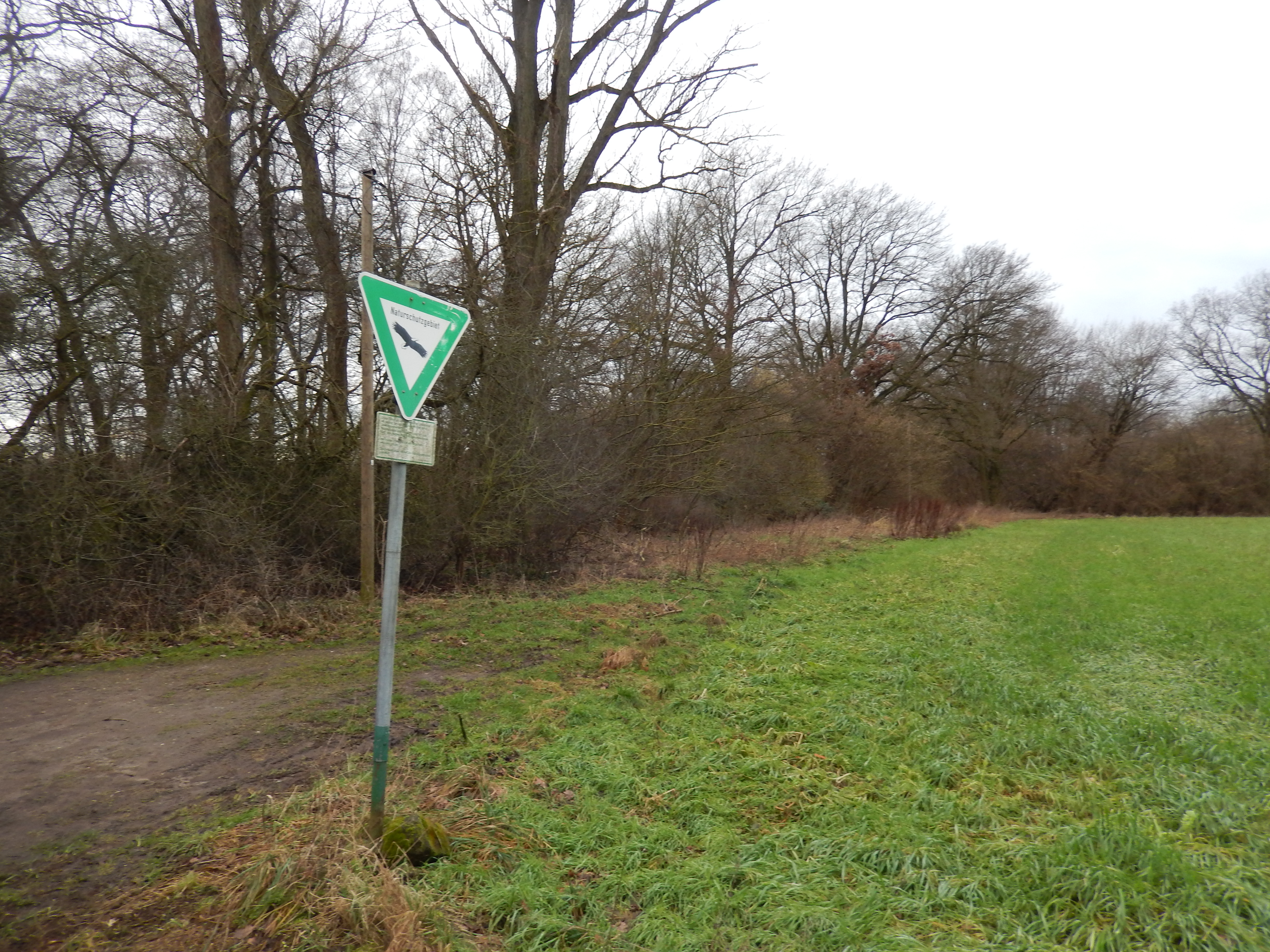 Naturschutzgebiet Im Himmelreich bei Lehrte